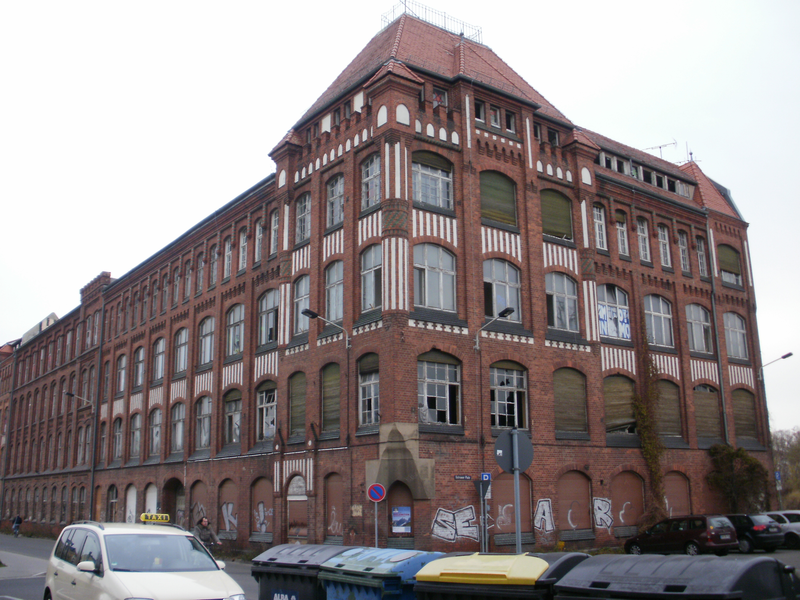 Fabrikanlage Ostrower Platz 2, Cottbus